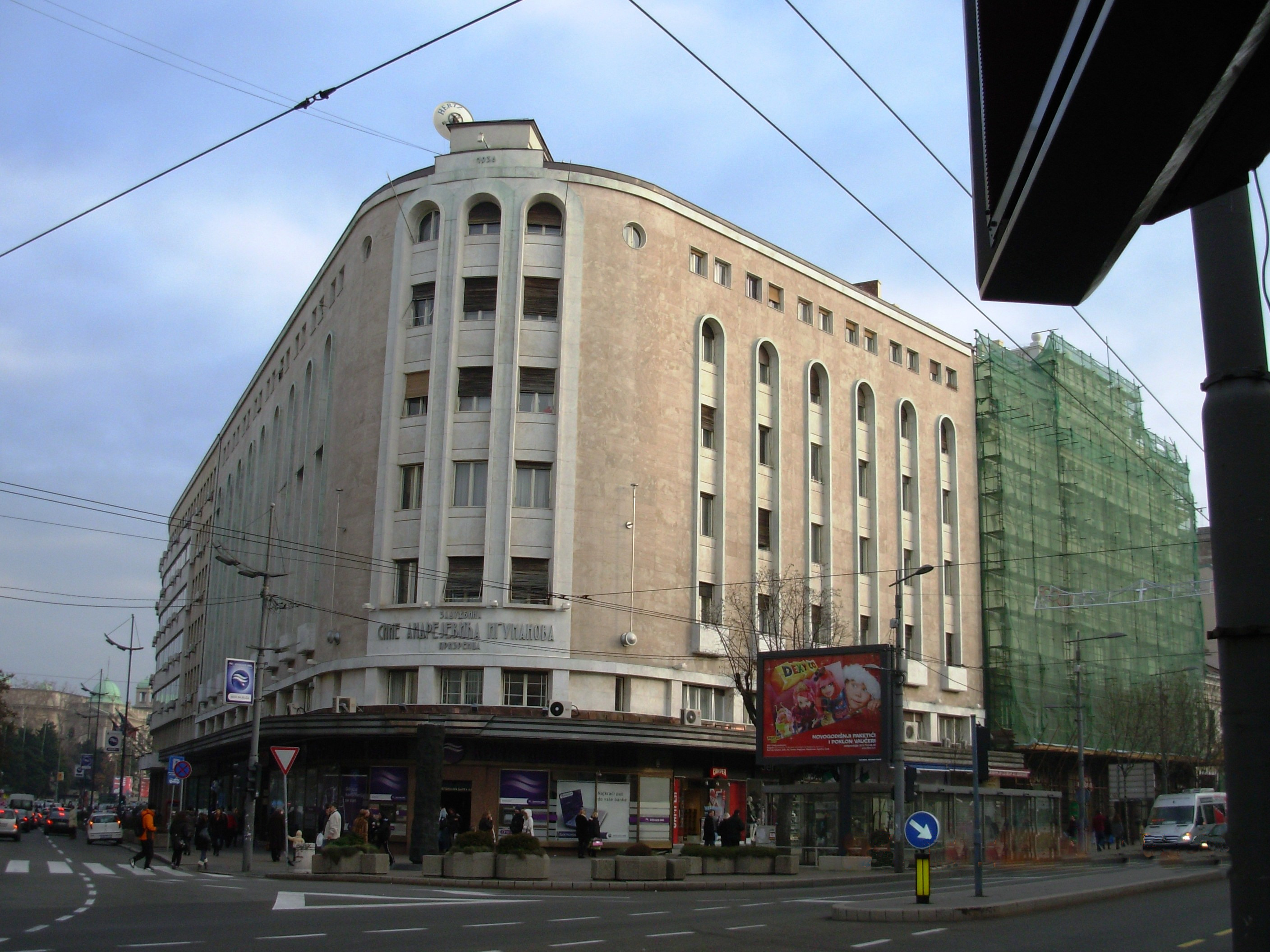 Zadužbina Sime Andrejevića Igumanova, Beograd. Slikao Goldfinger